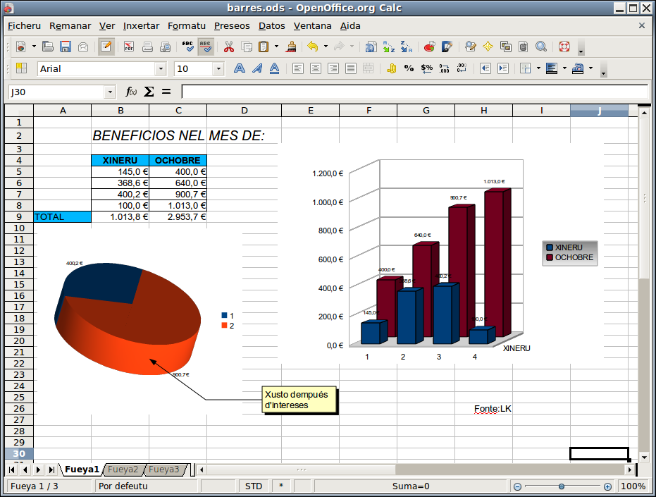 Amuesa de gráficos de barres fechos con OpenOffice 3.2